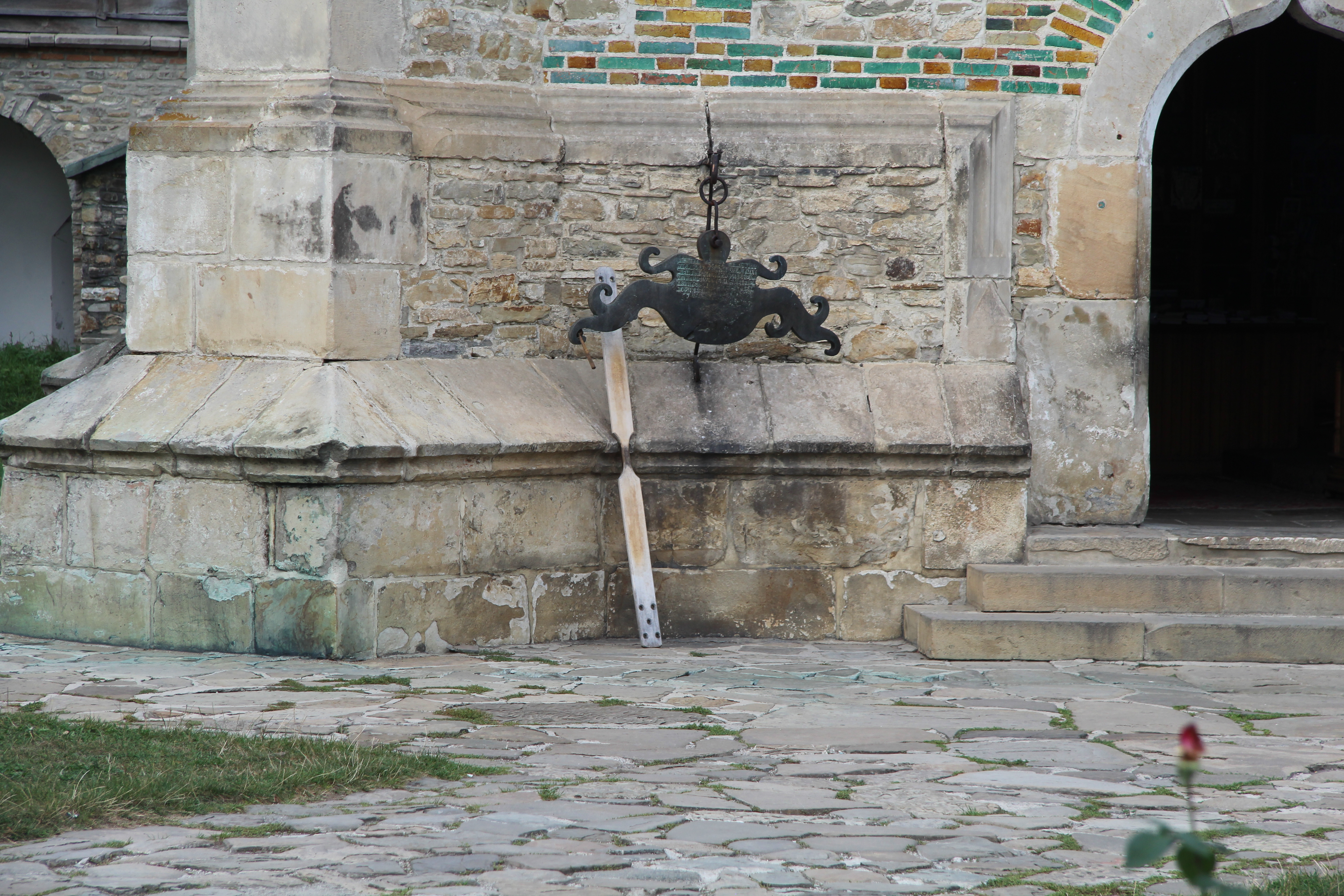 Diese Geräte dienen dem Ruf zum Gebet, indem auf ihnen durch Schlagen bzw. Klopfen Klang erzeugt wird